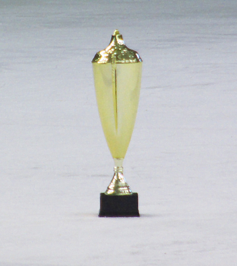 Puchar mistrzostwa Polski w hokeju na lodzie, Sanok 2012